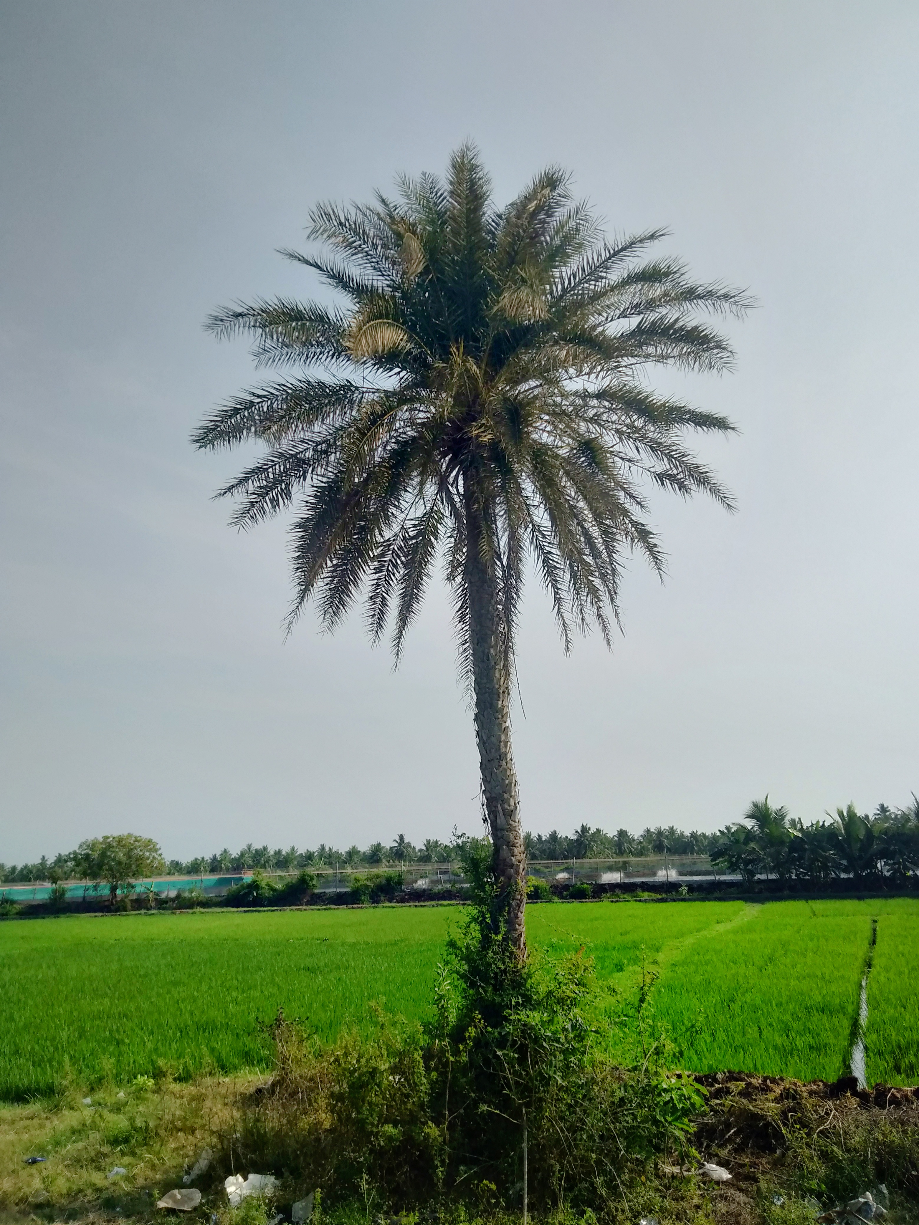 ఈత చెట్టు అమలాపురంలో లో